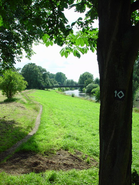 Der Wupperweg bei Opladen